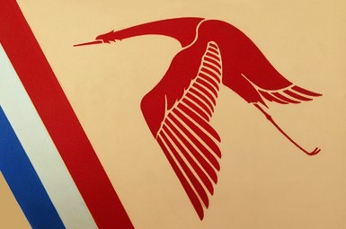 Cigogne peinte sur toile avec bande tricolore ses as de la Spa 3